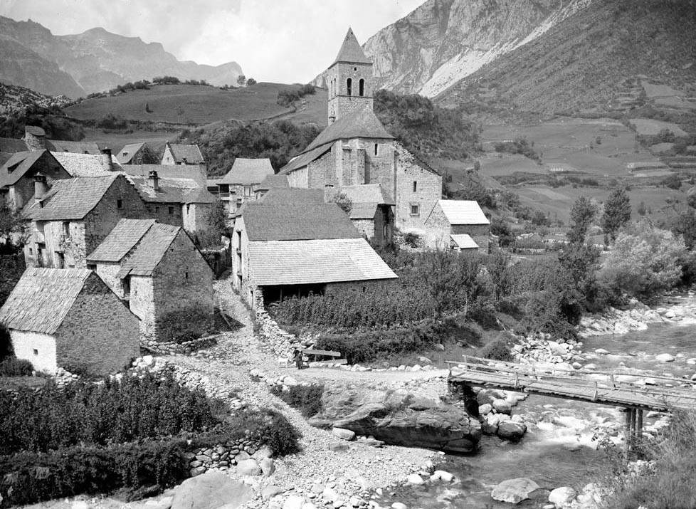 Imatge